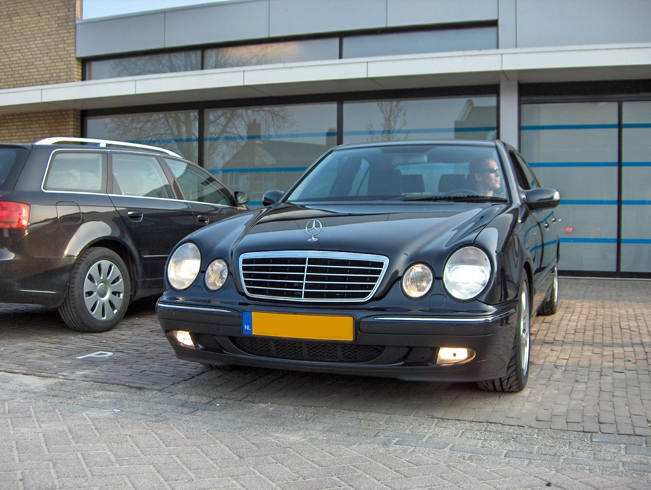 Foto zelf gemaakt van de auto van een bekende.